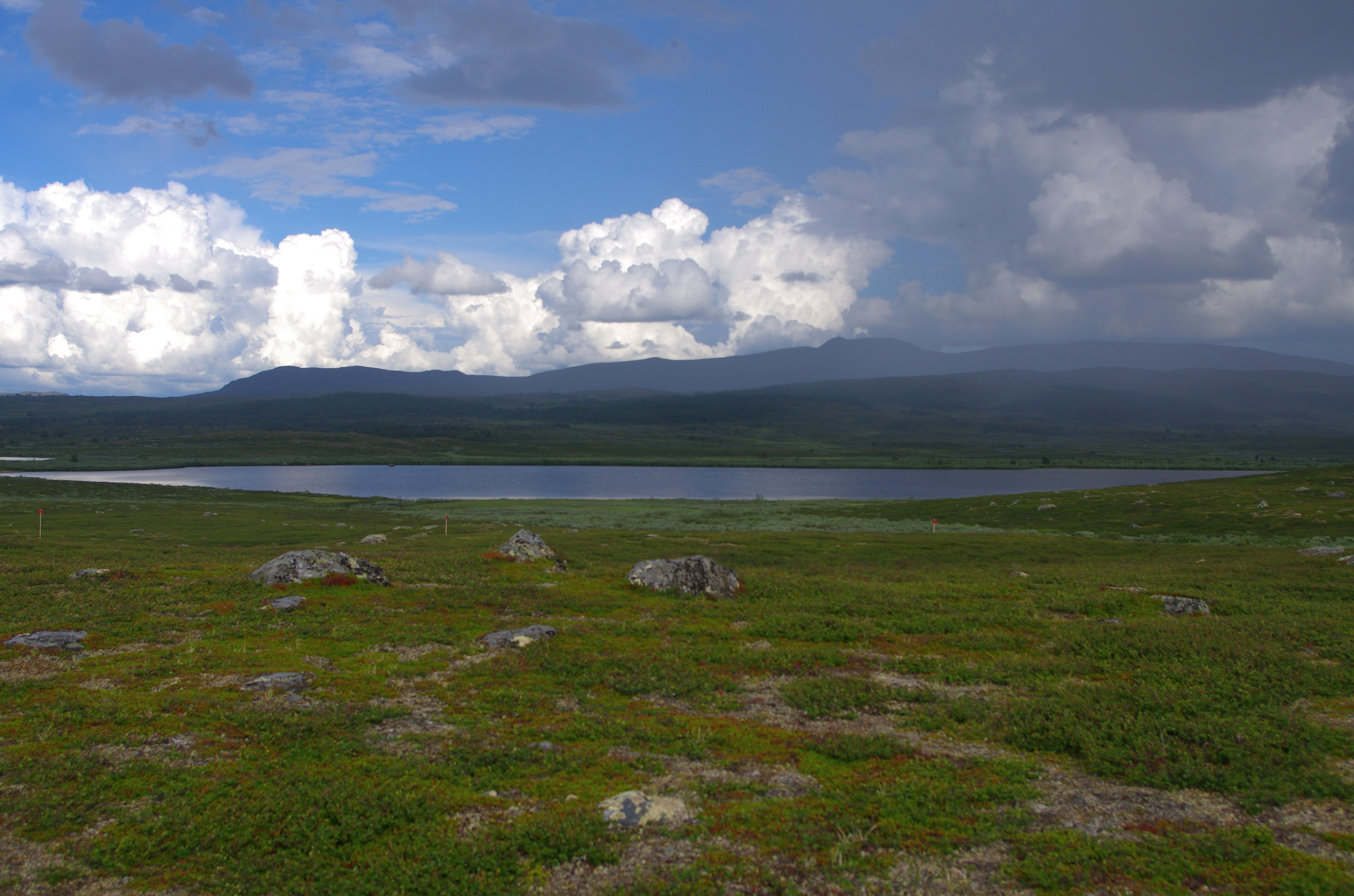 Njallabläkke (Njallapliehkie) en sjö i Arjeplogs kommun i Lappland i Sverige.